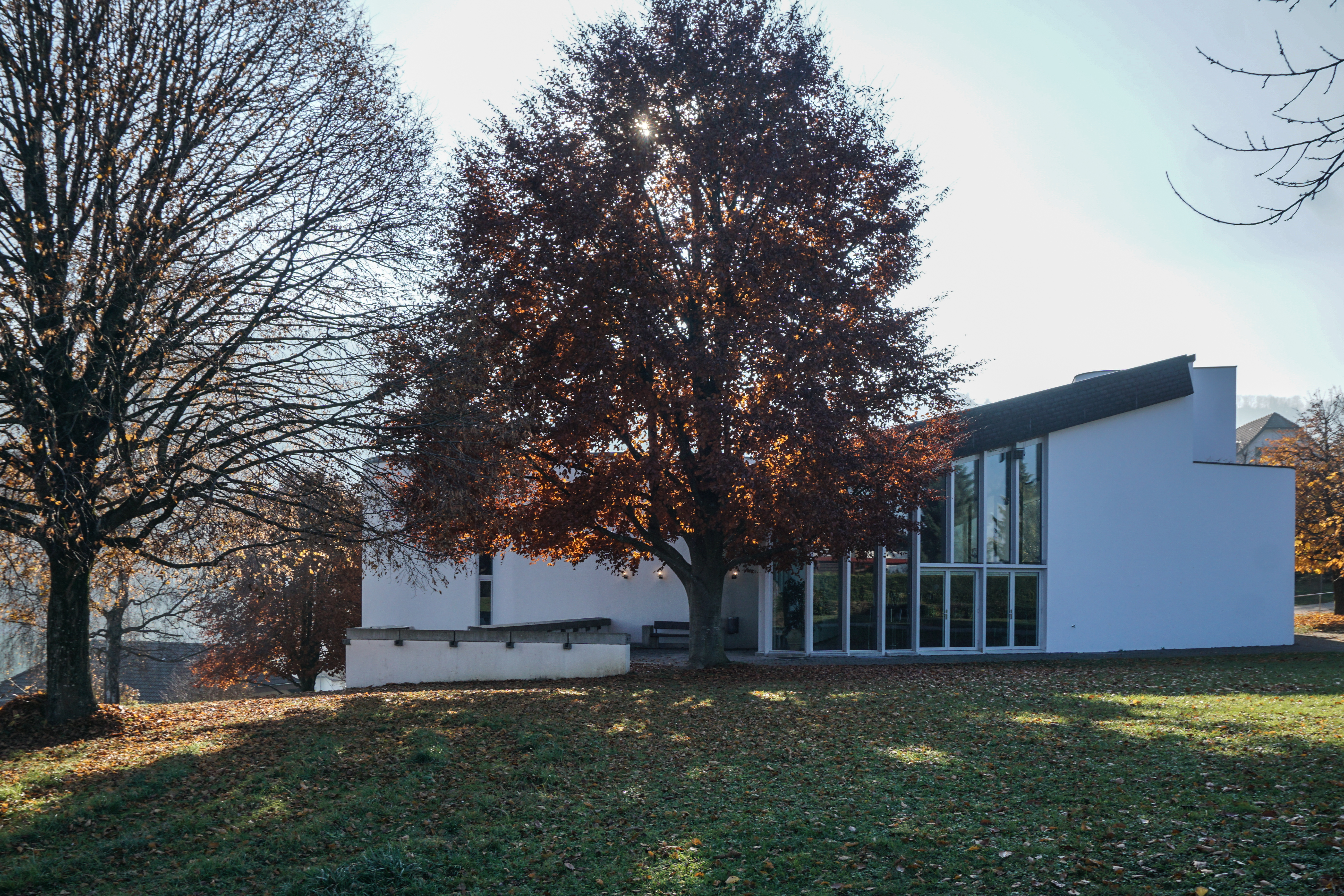 Oekumenisches Zentrum St. Andreas in Kehrsatz, Ostseite